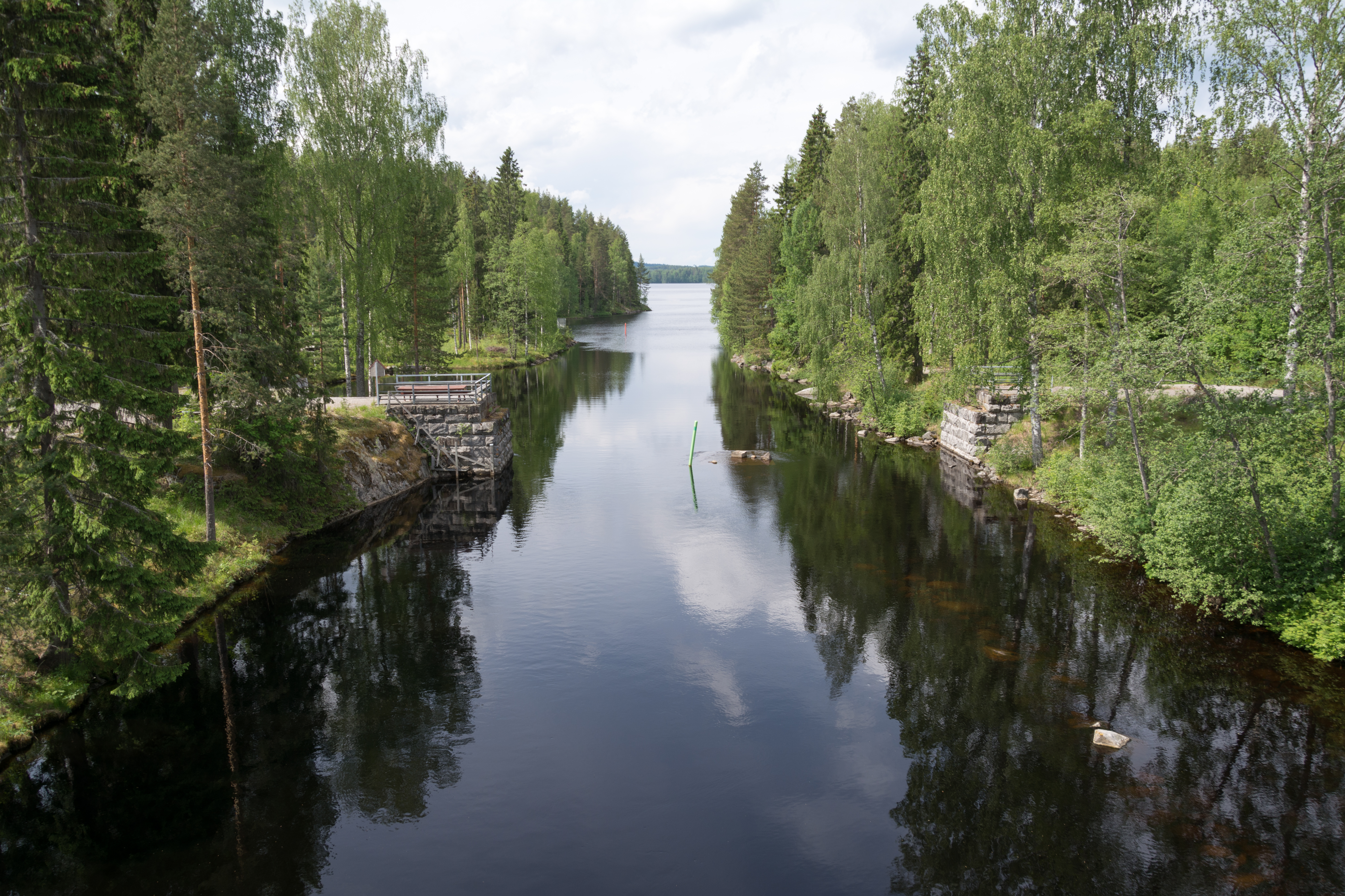 Kaavinkosken kanava Kaavilla